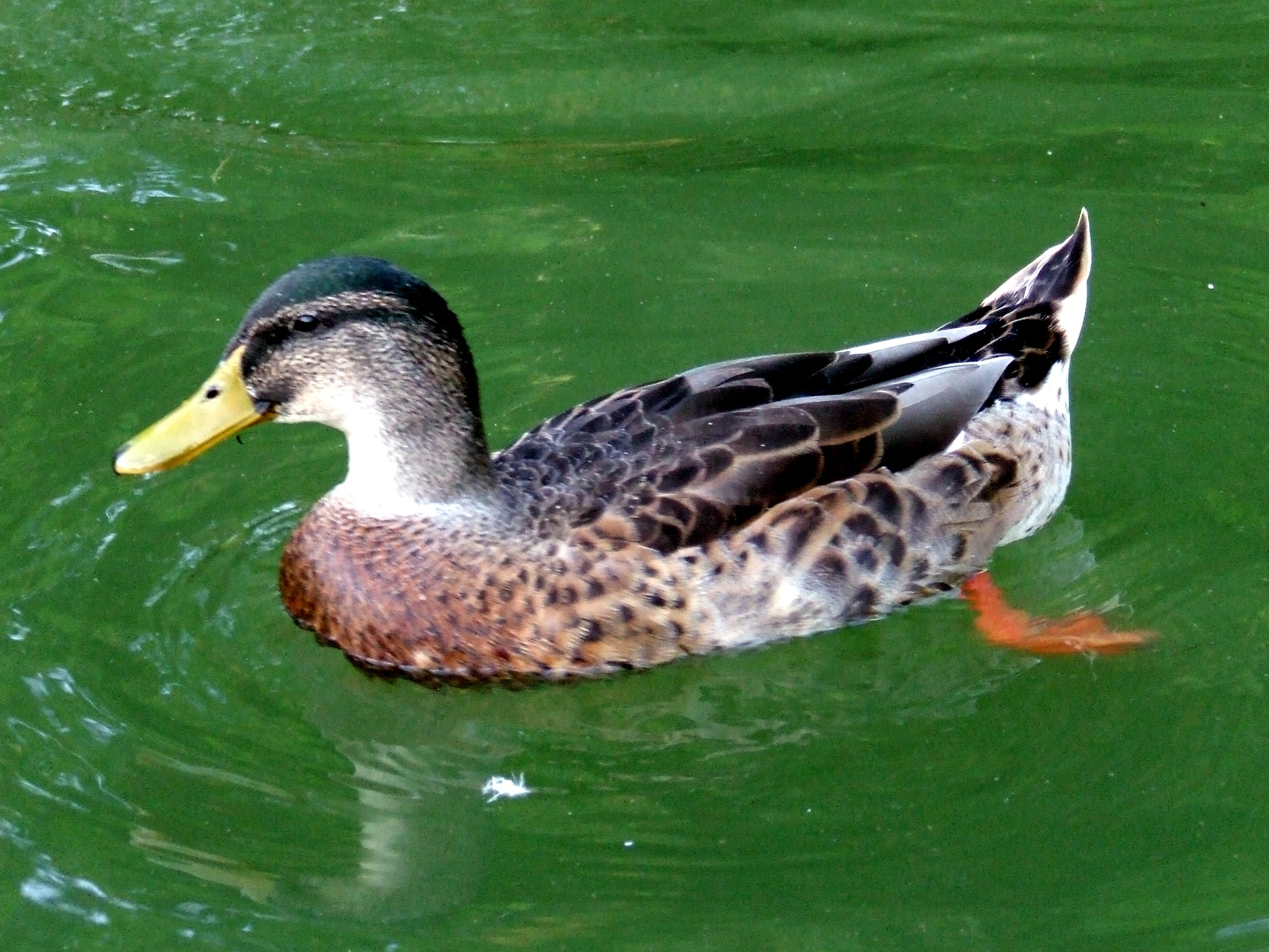 Anatide a Roma, Giardin del Lago di Villa Borghese